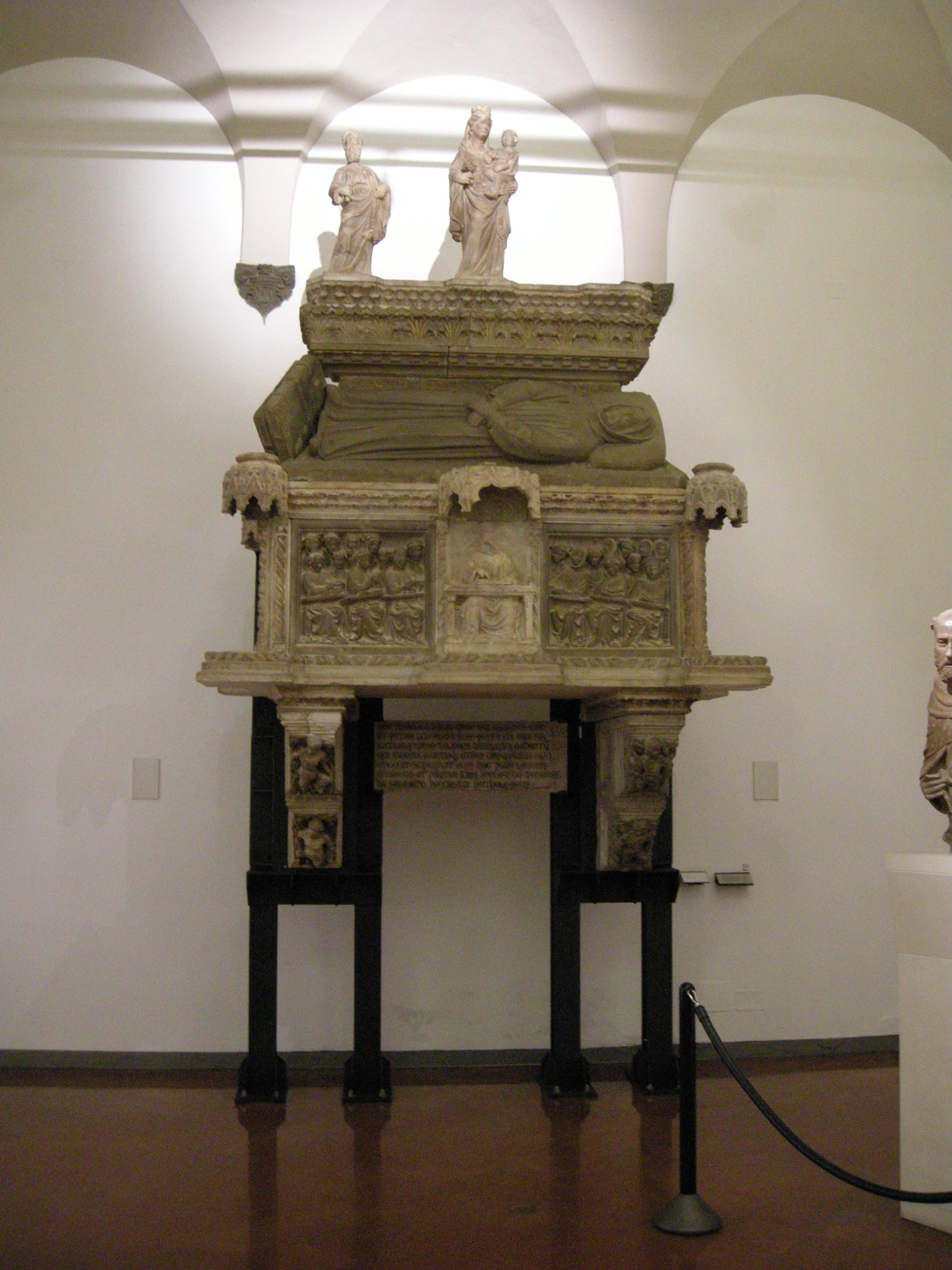 Andrea da Fiesole, Sepolcro di Bartolomeo da Saliceto (+ 1411), oggi esposto nel Museo civico medievale a Bologna.